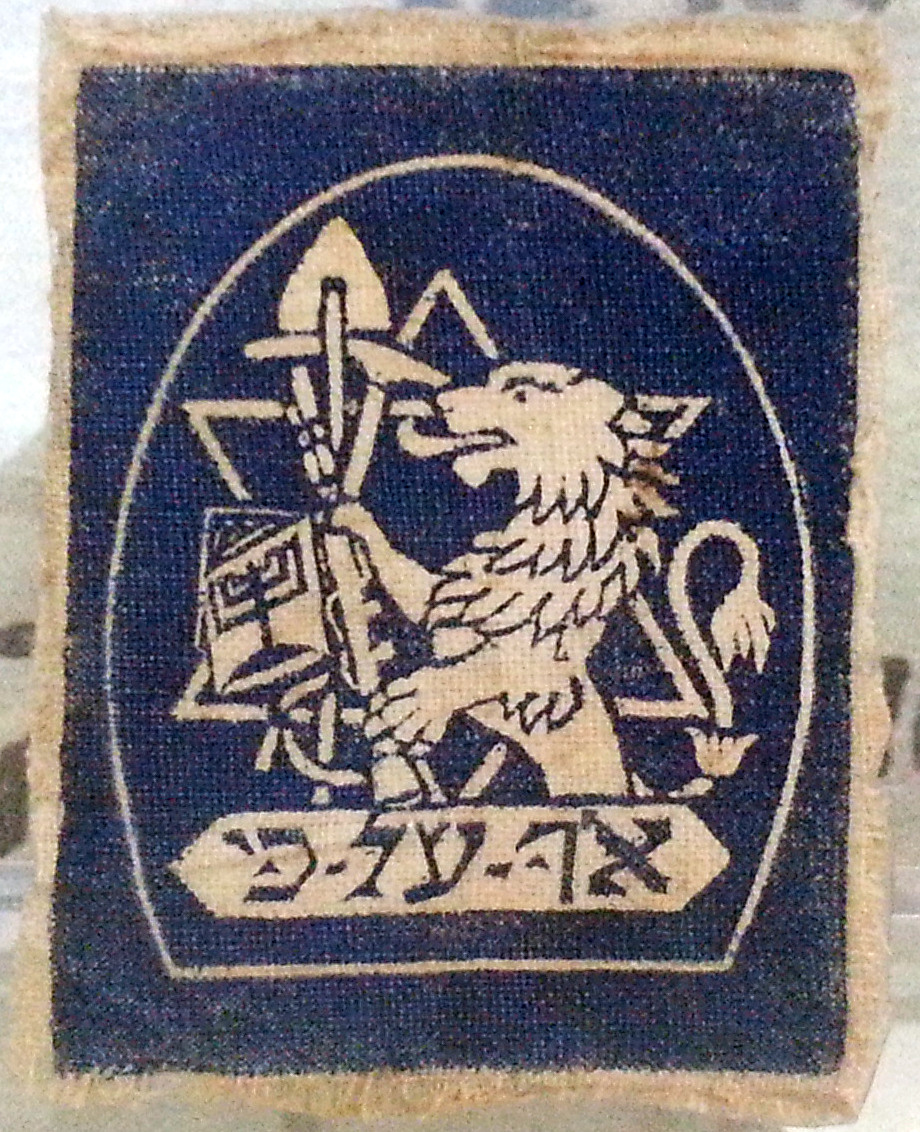 סמל מעפילי עליית אף על פי. מוצג בתעורכת קבע במכון ז'בוטינסקי בתל אביב